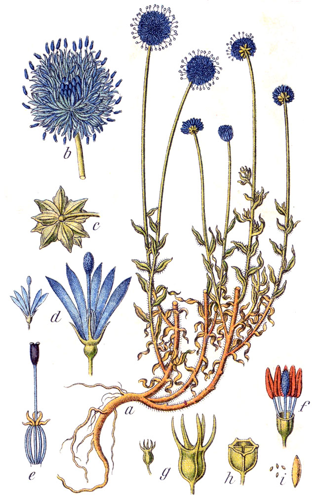 Jasione montana L. Original Caption Kleine Schafskabiose, Jasione montana